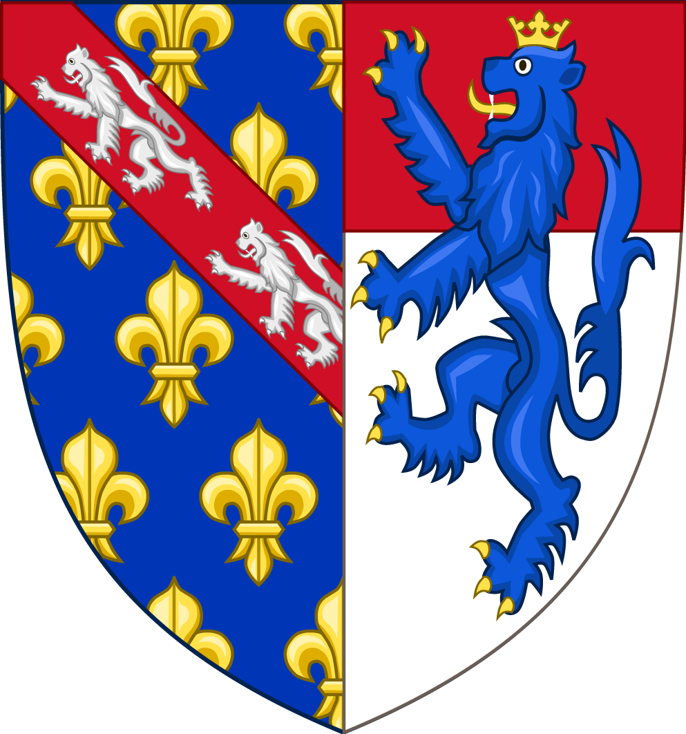 Armes de Catherine de Vendôme, comtesse héritière de Vendôme (écu classique comme sur les verrières de Chartres)